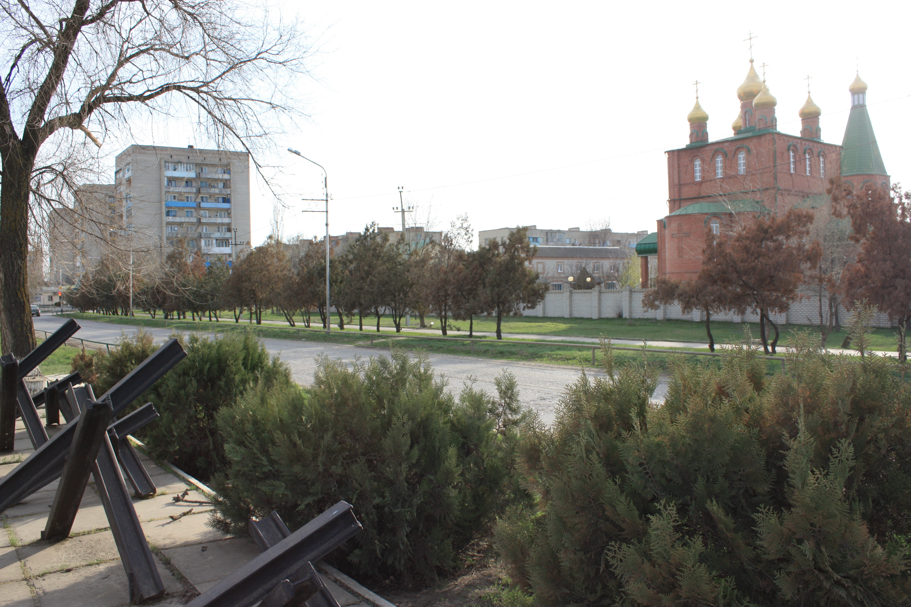 Neftekumsk, Stavropol Krai, Russia